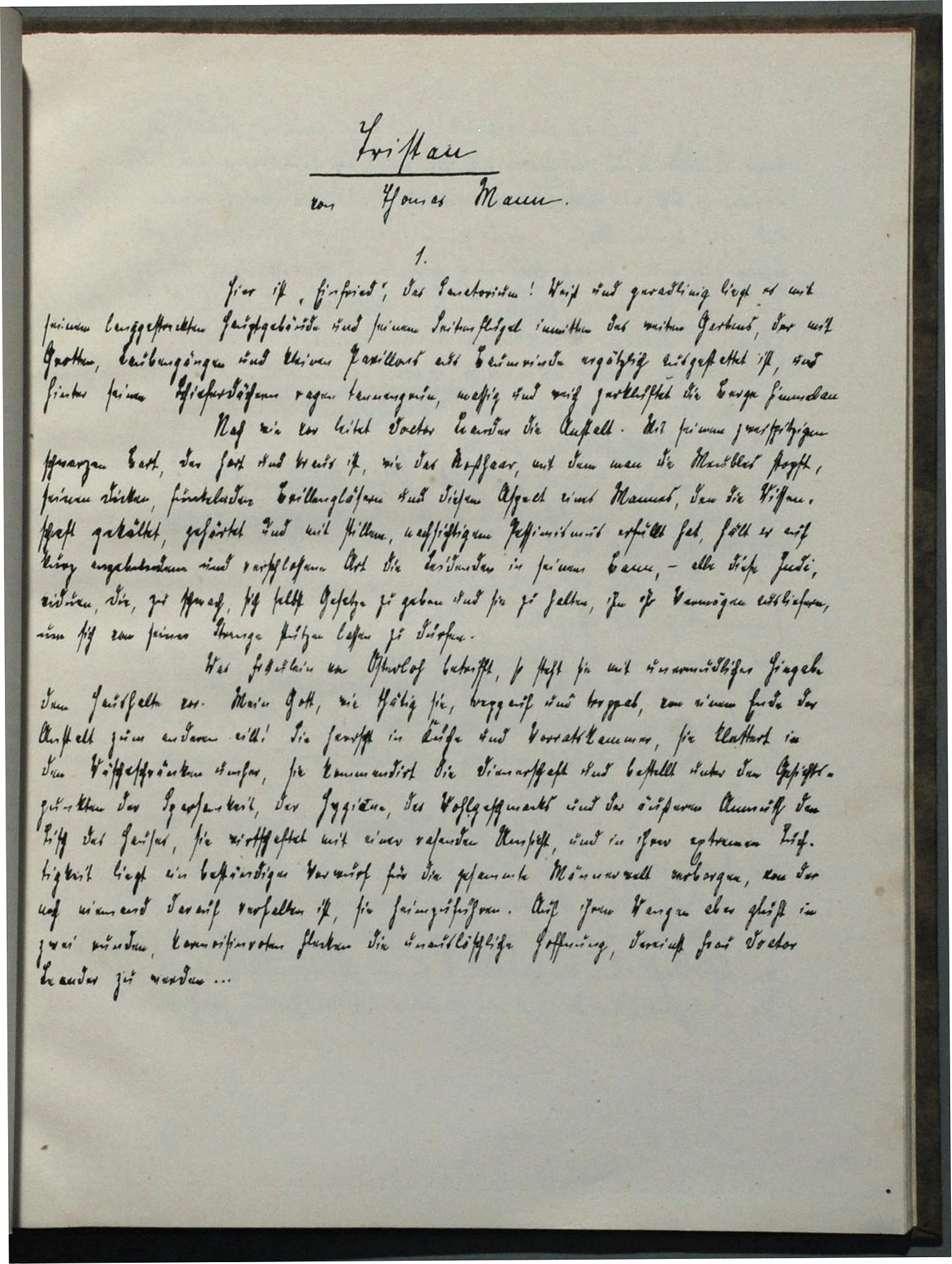 Thomas Mann.Tristan. Faksimile des Manuskripts. In: Deutsche Dichterhandschriften. Hrsg. von Dr. Hans Martin Elster. Erster Band: Thomas Mann. Dresden: Lehmann & Schulze 1920. Text: Tristan von Thomas Mann 1. Hier ist Einfried, das Sanatorium! Weiß und geradlinig liegt es mit seinem langgestreckten Hauptgebäude und seinem Seitenflügel inmitten des weiten Gartens, der mit Grotten, Laubengängen und kleinen Pavillons aus Baumrinde ergötzlich ausgestattet ist, und hinter seinen Schieferdächern ragen tannengrün, massig und weich zerklüftet die Berge himmelan. Nach wie vor leitet Doktor Leander die Anstalt. Mit seinem zweispitzigen schwarzen Bart, der hart und kraus ist wie das Roßhaar, mit dem man die Möbel stopft, seinen dicken, funkelnden Brillengläsern und diesem Aspekt eines Mannes, den die Wissen- schaft gekältet, gehärtet und mit stillem, nachsichtigem Pessimismus erfüllt hat, hält er auf kurz angebundene und verschlossene Art die Leidenden in seinem Bann, — alle diese Indi- viduen, die, zu schwach, sich selbst Gesetze zu geben und sie zu halten, ihm ihr Vermögen ausliefern, um sich von seiner Strenge stützen lassen zu dürfen. Was Fräulein von Osterloh betrifft, so steht sie mit unermüdlicher Hingabe dem Haushalte vor. Mein Gott, wie tätig sie, treppauf und treppab, von einem Ende der Anstalt zum anderen eilt! Sie herrscht in Küche und Vorratskammer, sie klettert in den Wäscheschränken umher, sie kommandiert die Dienerschaft und bestellt unter den Gesichts- punkten der Sparsamkeit, der Hygiene, des Wohlgeschmacks und der äußeren Anmut den Tisch des Hauses, sie wirtschaftet mit einer rasenden Umsicht, und in ihrer extremen Tücht- igkeit liegt ein beständiger Vorwurf für die gesamte Männerwelt verborgen, von der noch niemand darauf verfallen ist, sie heimzuführen. Auf ihren Wangen aber glüht in zwei runden, karmoisinroten Flecken die unauslöschliche Hoffnung, dereinst Frau Doktor Leander zu werden...